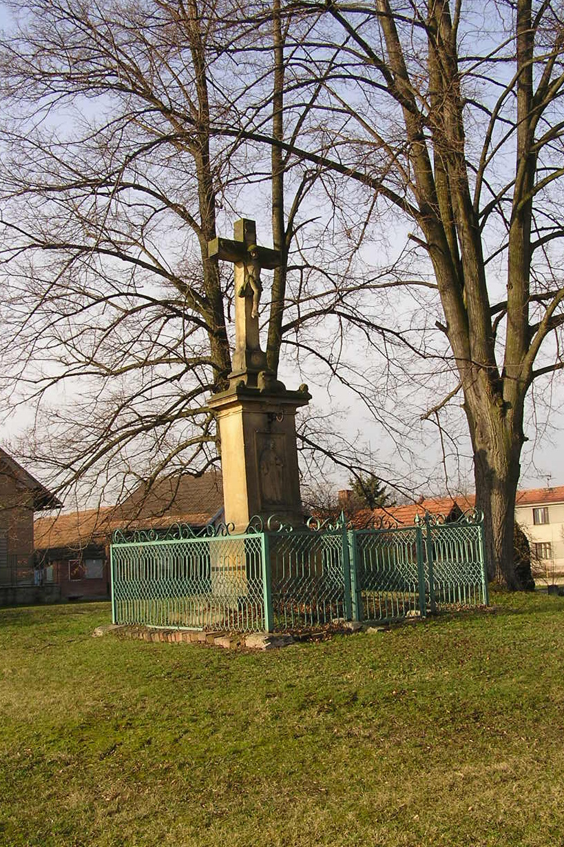 Klamoš - Boží muka